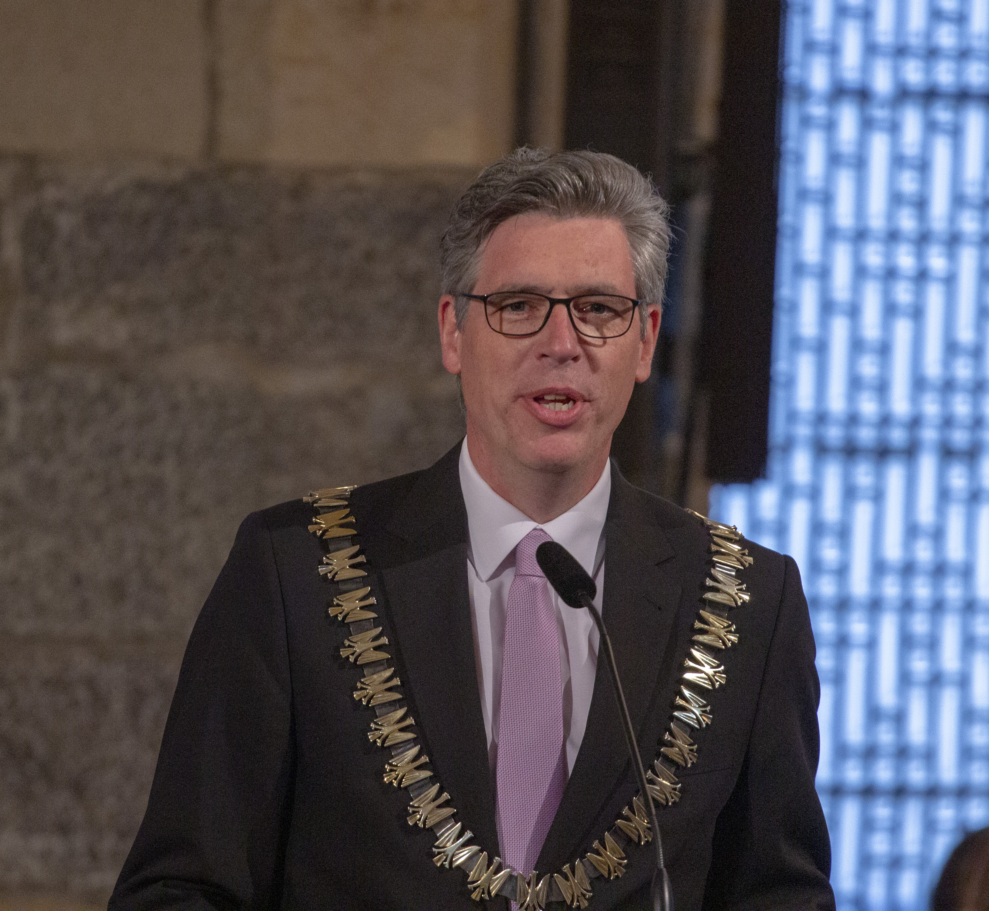 Marcel Philipp im Aachener Rathaus im Rahmen des Karlspreises 2019 am 30. Mai 2019 in Aachen.